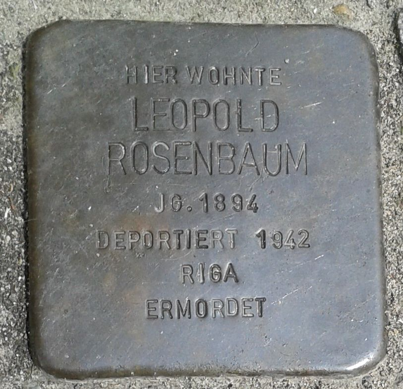 Stolperstein Datteln Mittelstraße 18 Leopold Rosenbaum